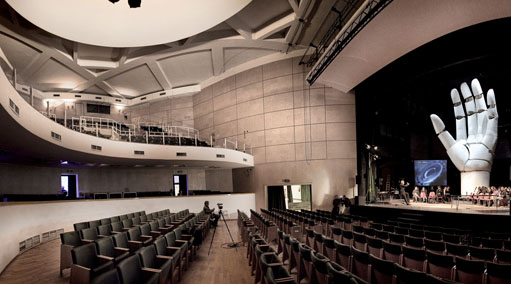 Platea Teatro dell'Arte, platea